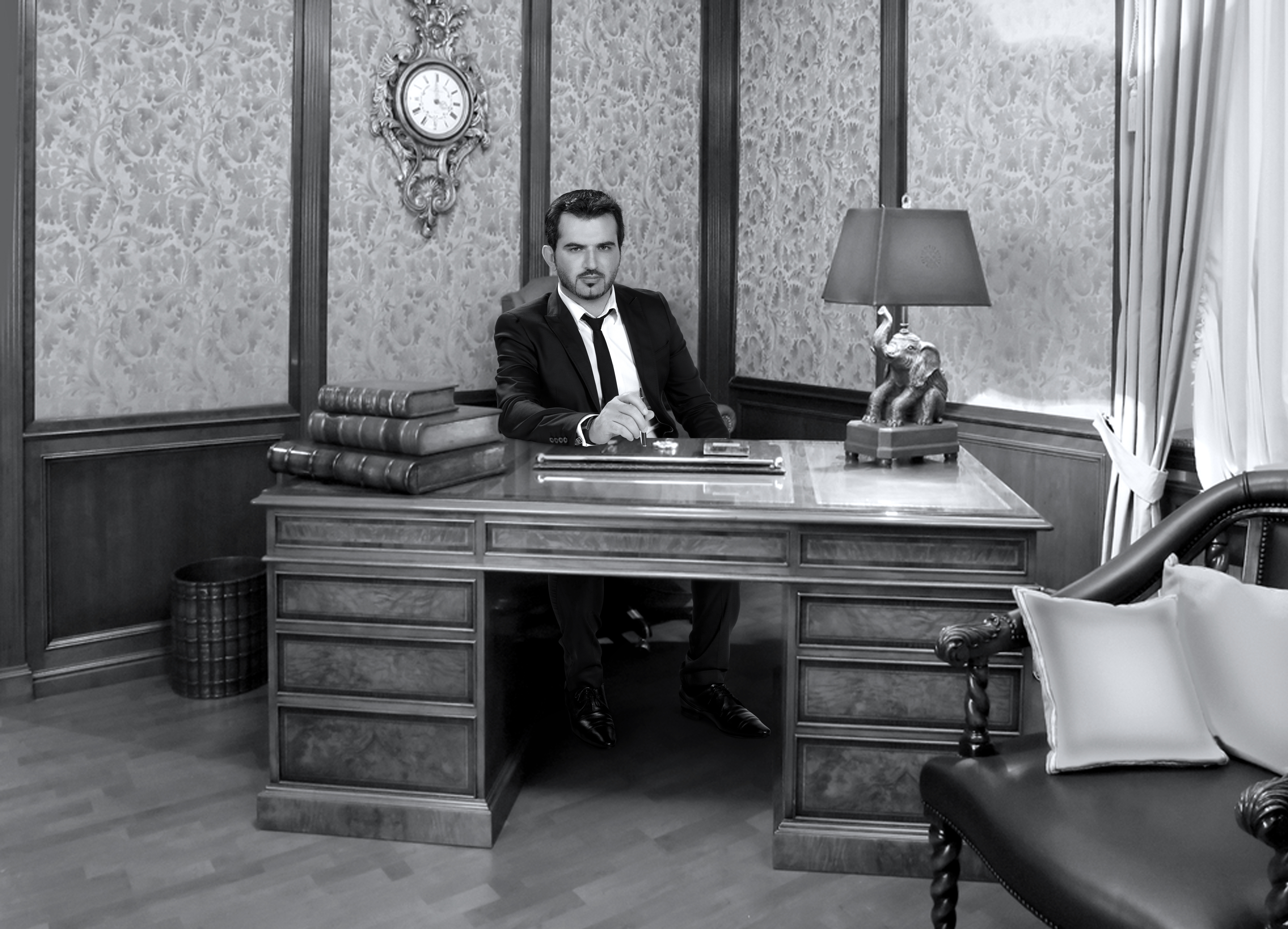 صحفي ومقدم برامج ، باحث في الشؤون السياسية والعلاقات الدولية